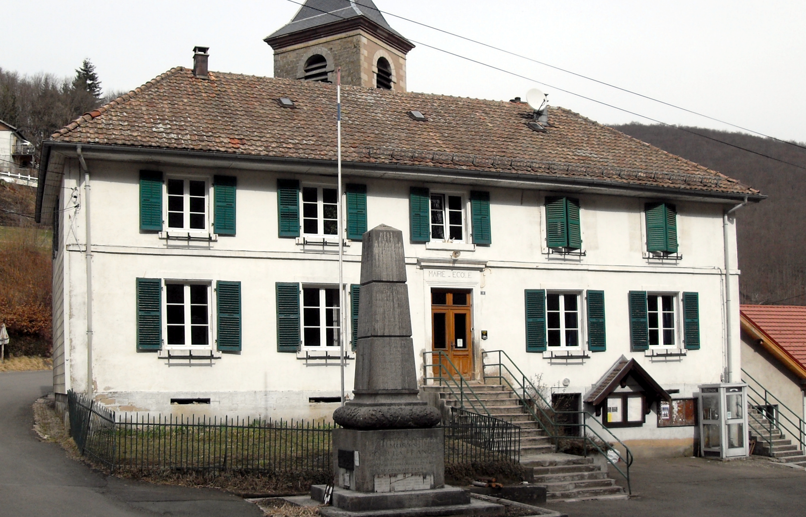 La mairie-école d'Auxelles-Haut